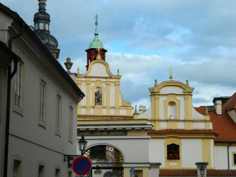 Францисканский монастырь